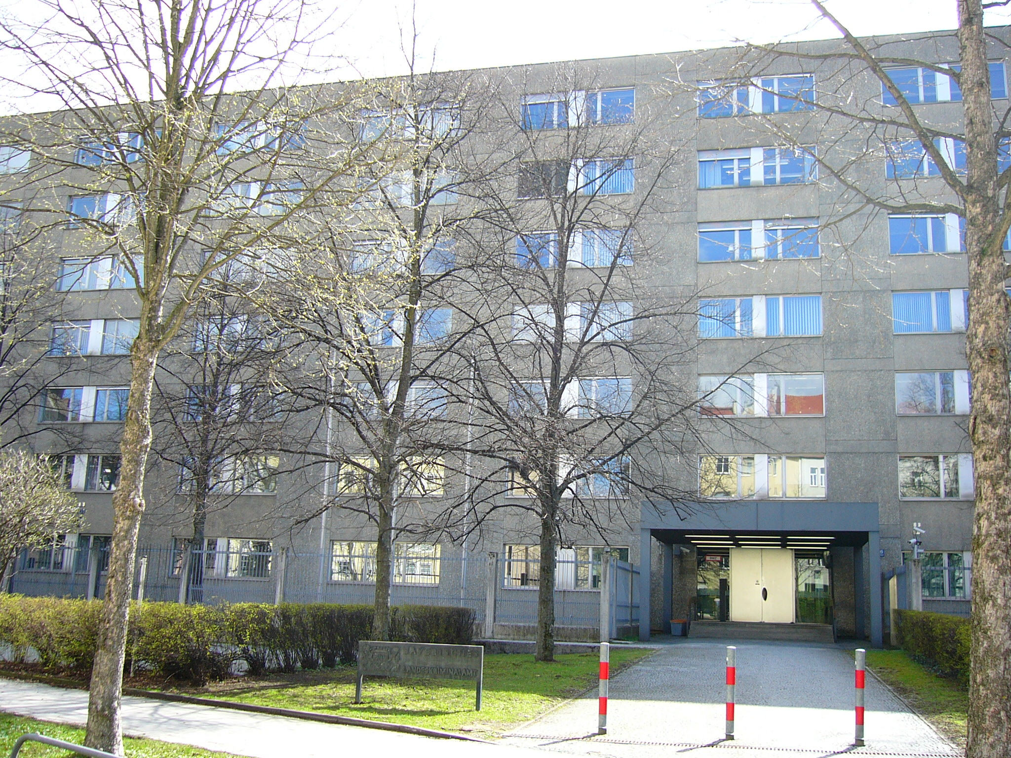 Bayerisches Landeskriminalamt, München, Maillingerstr. 15